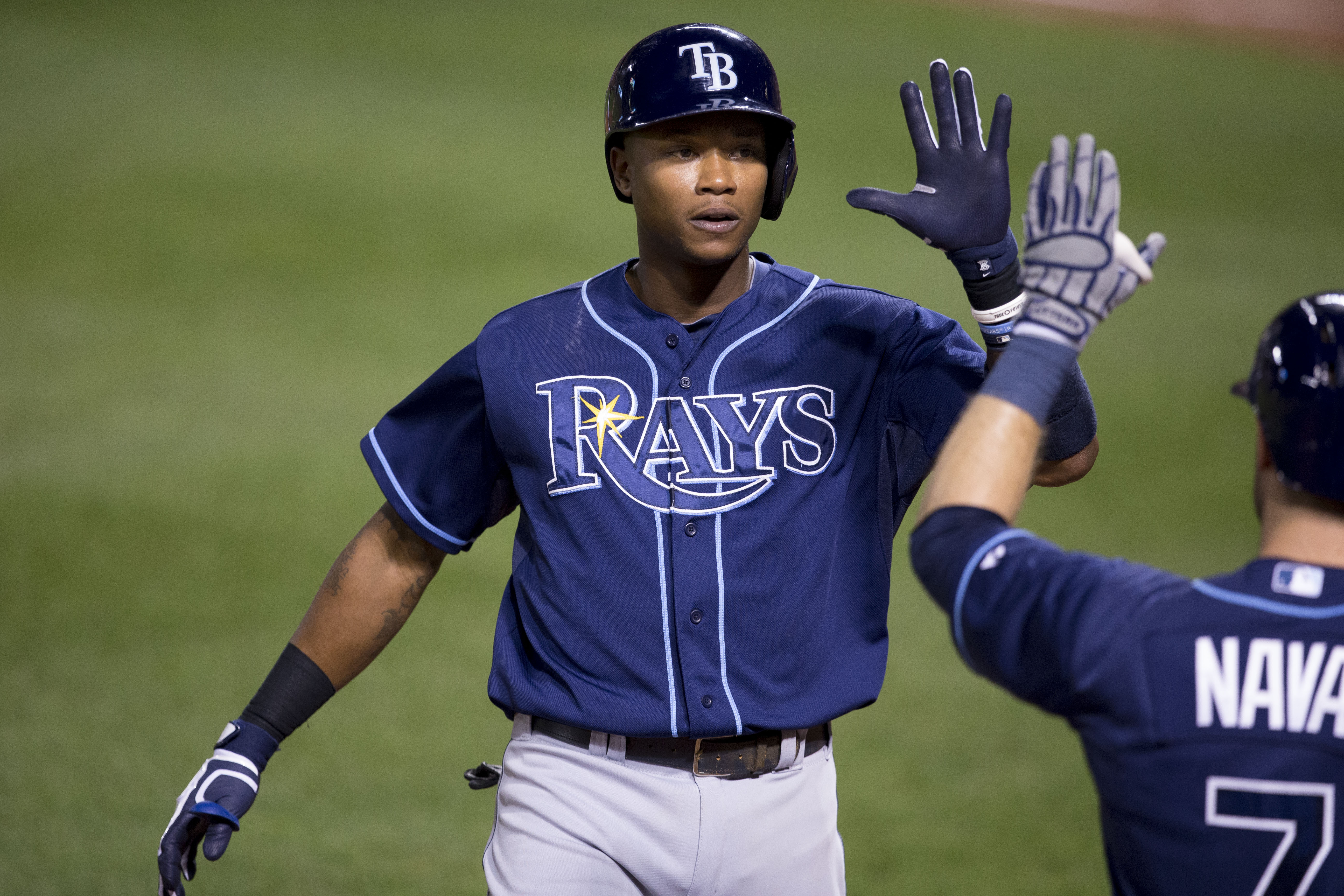 Tim Beckham